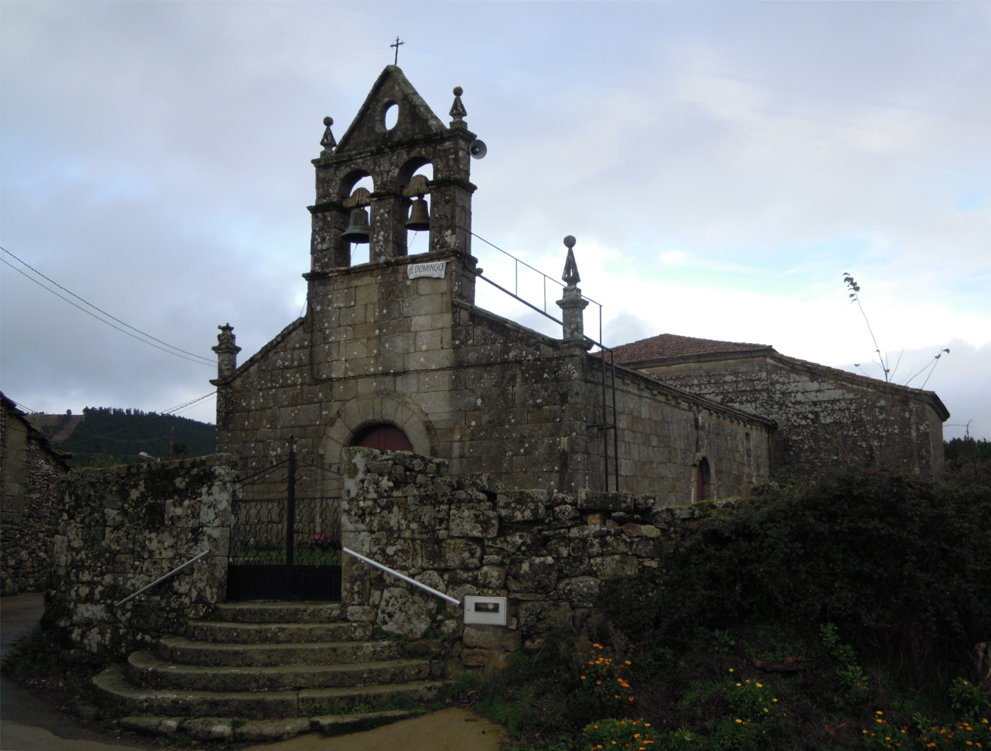 Igrexa parroquial de Santa María de Traseirexa (Vilardevós).